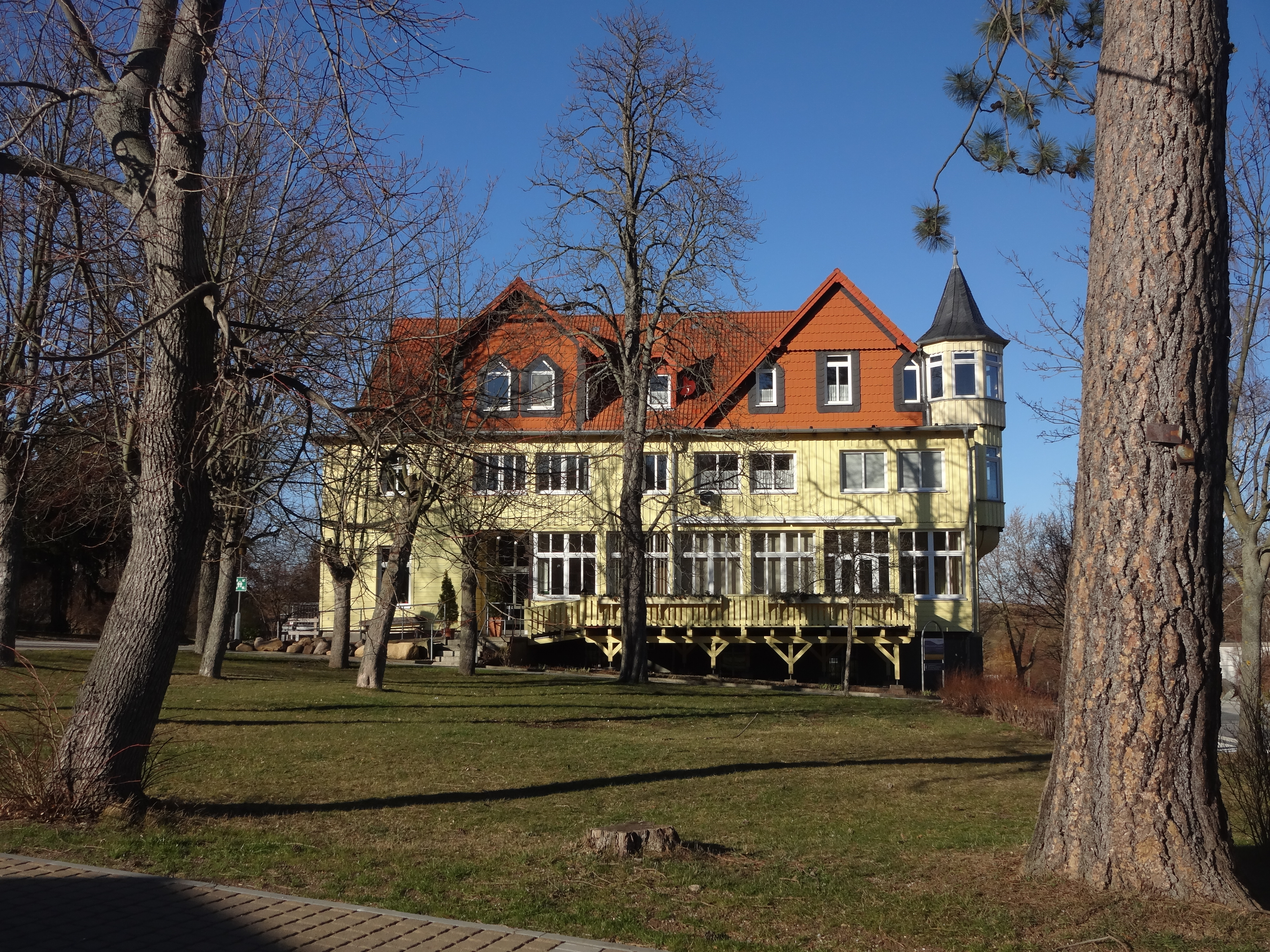 denkmalgeschütztes ehemaliges Hotel Prinz Botho im Goetheweg 25 in Darlingerode